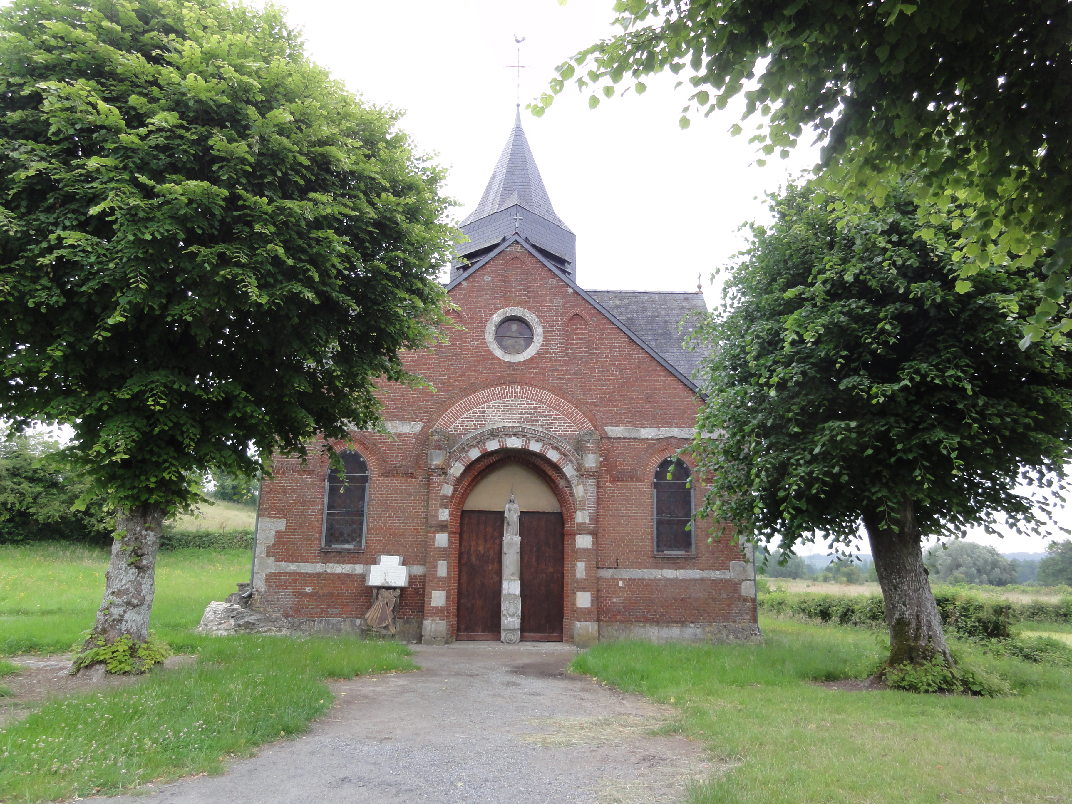 La Bouteille (Aisne), au lieu-dit de Foigny, en souvenir de l'abbaye de Floigny Foigny, la chapelle, façade